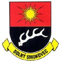 Alsótátrafüred címere